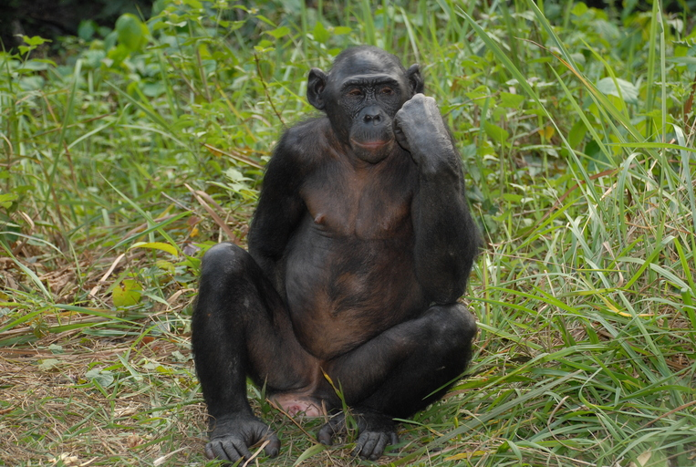 Pan paniscus